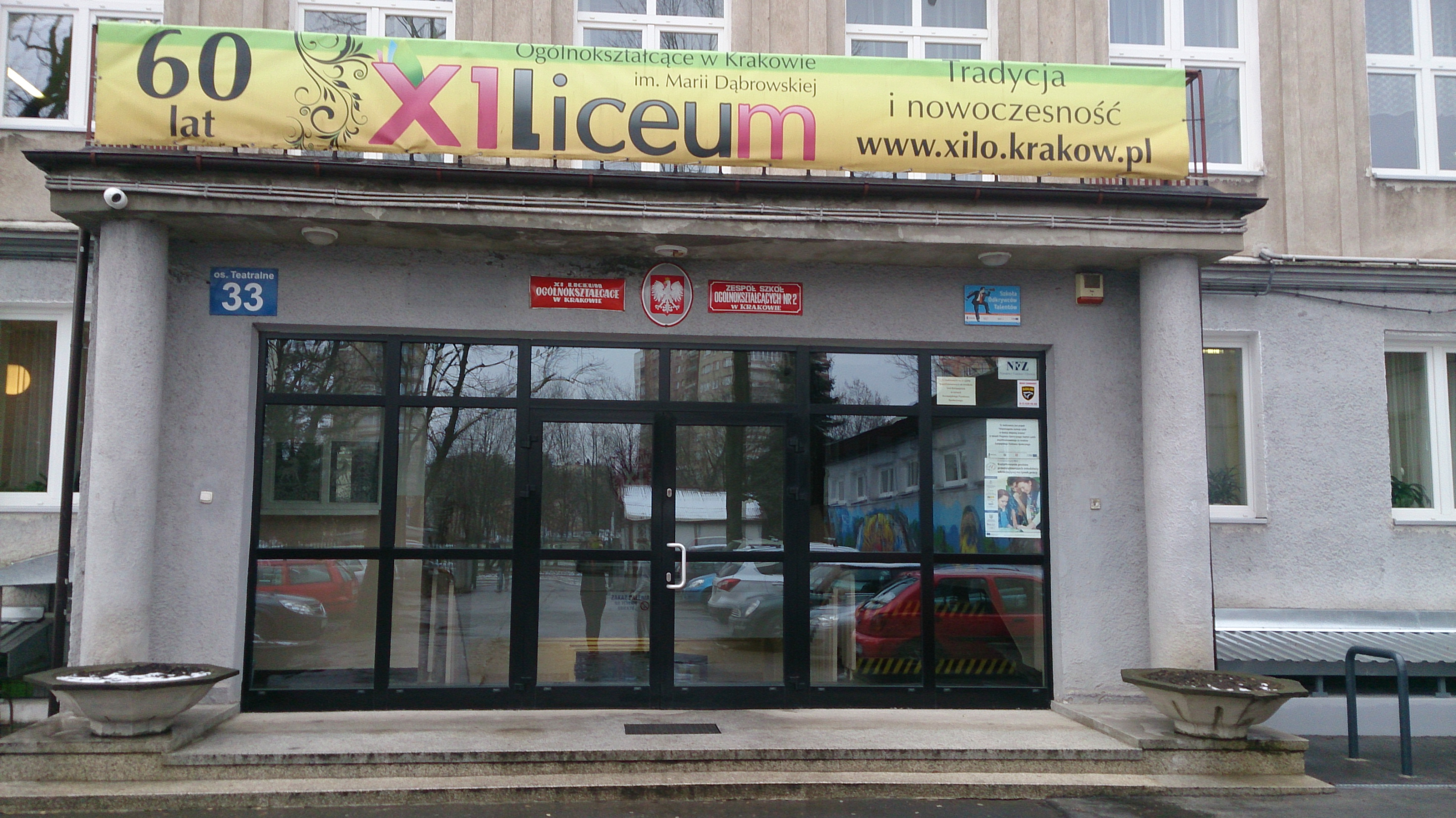 Szkoła obecnie